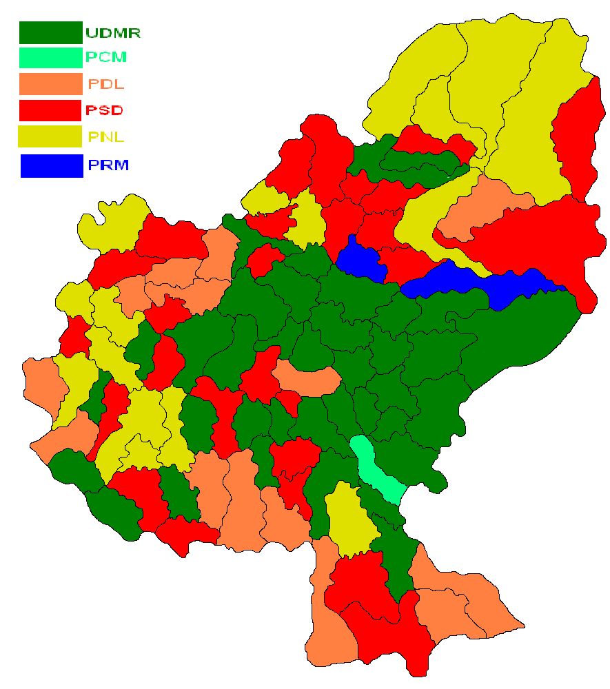 Harta politica a județului Mureș .